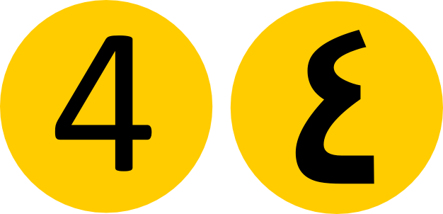 علامت خط 4 مترو تهران